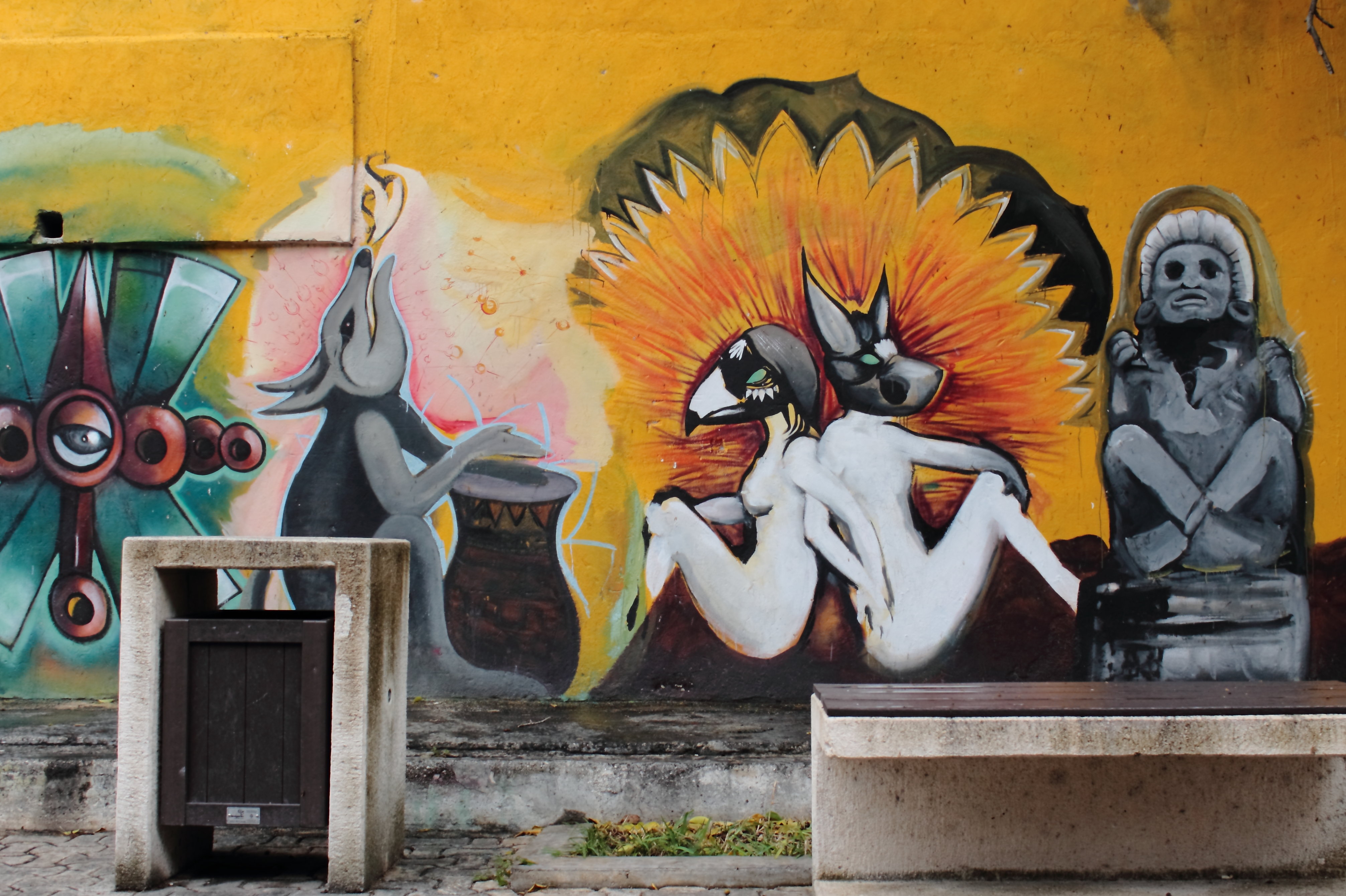 Graffiti en Playa del Carmen, Quintana Roo.